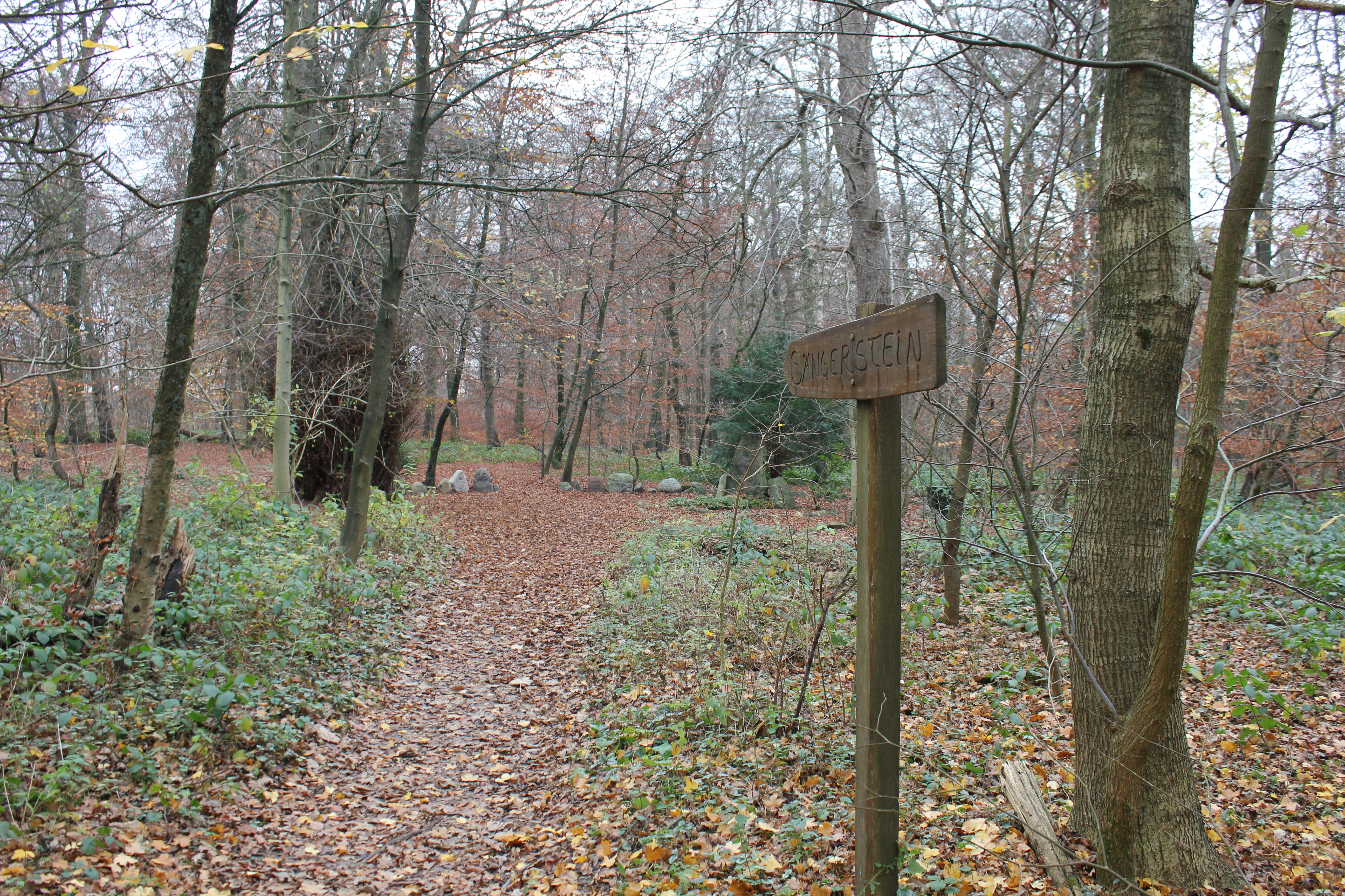 Straßenschild zum Sängerstein, Marienhölzung, Flensburg 2011